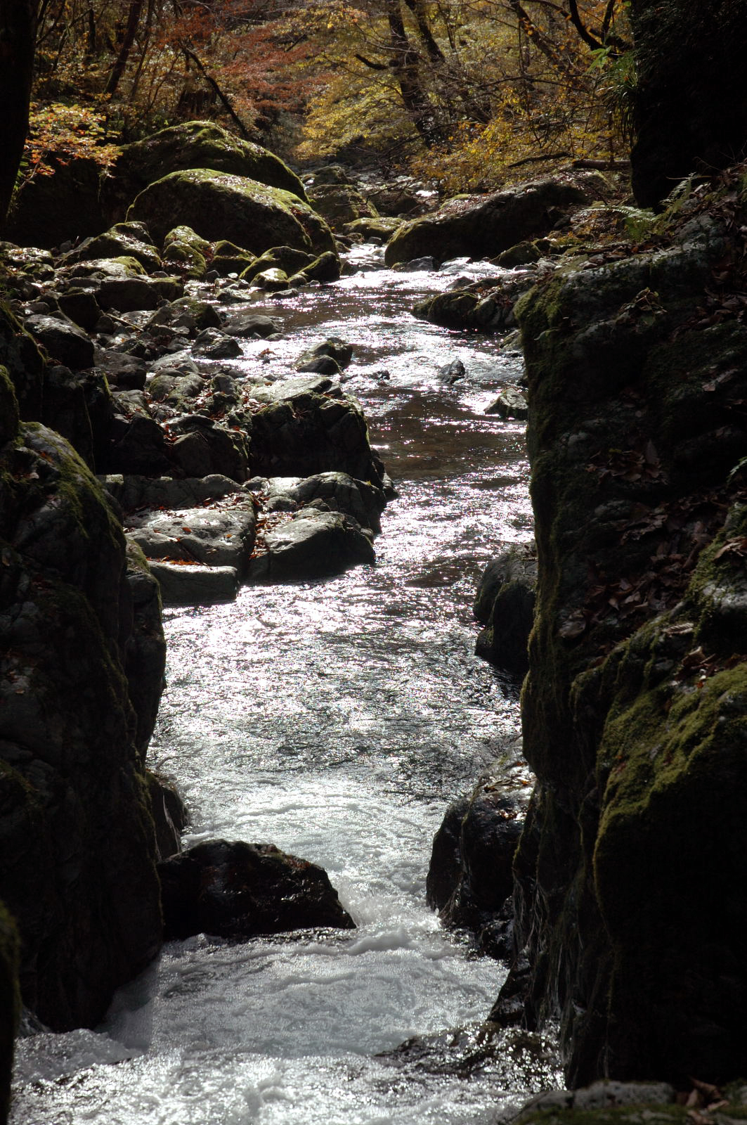 Onzui ravine